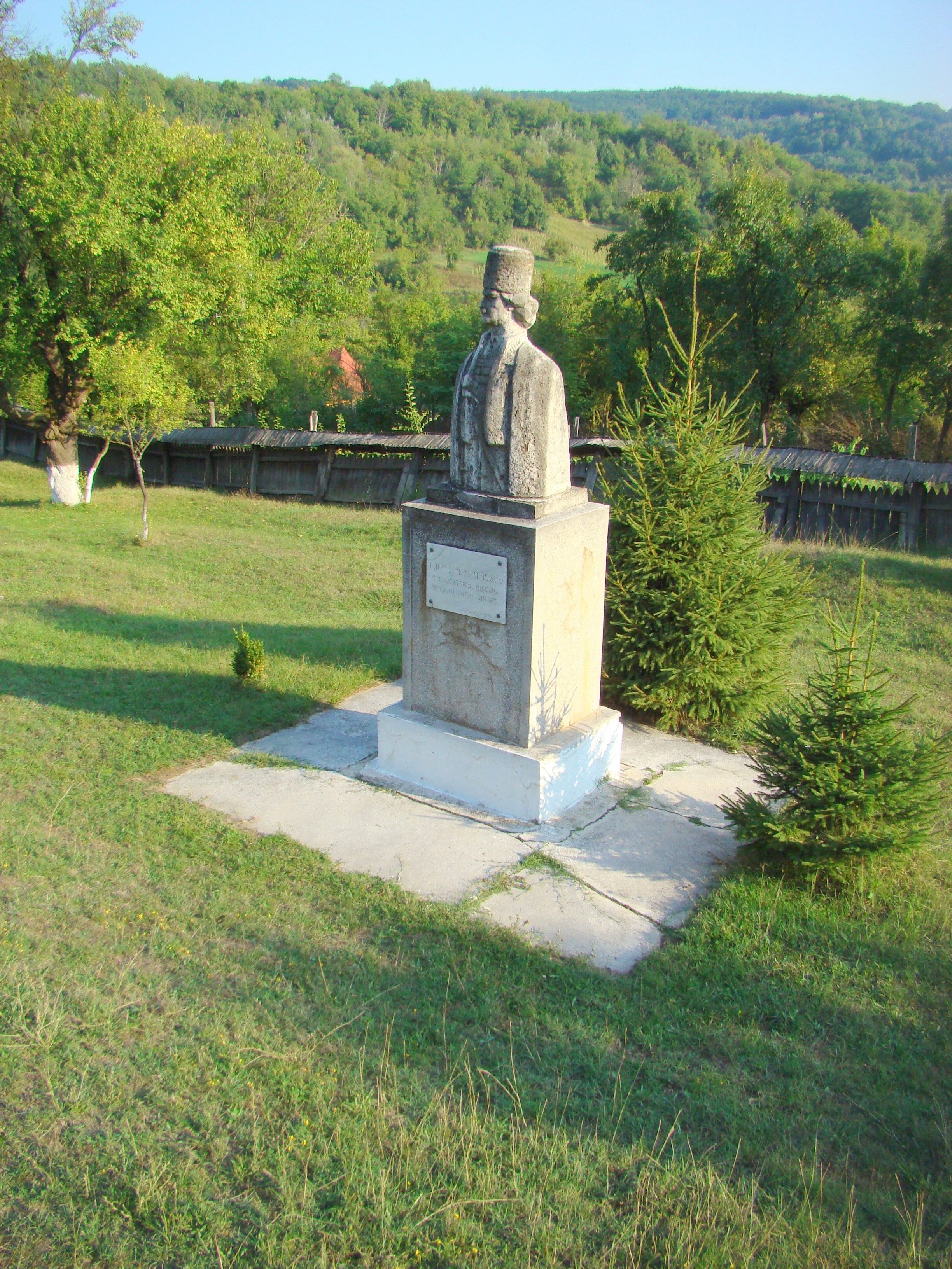 Bustul lui Tudor Vladimirescu, sat Vladimir; comuna Vladimir